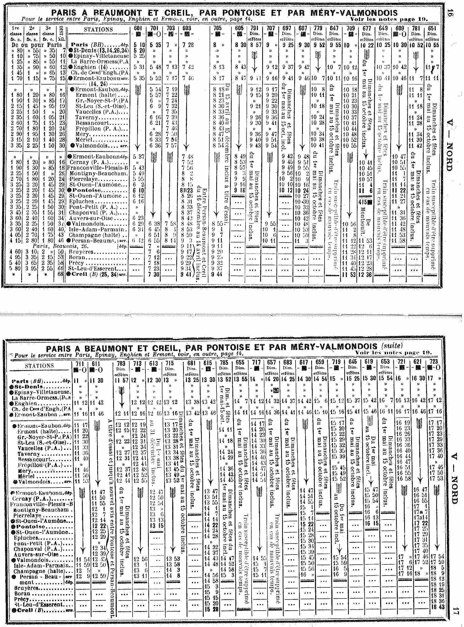 Horaires de la ligne Paris (Gare du Nord) - Beaumont via Pontoise ou via Valmondois